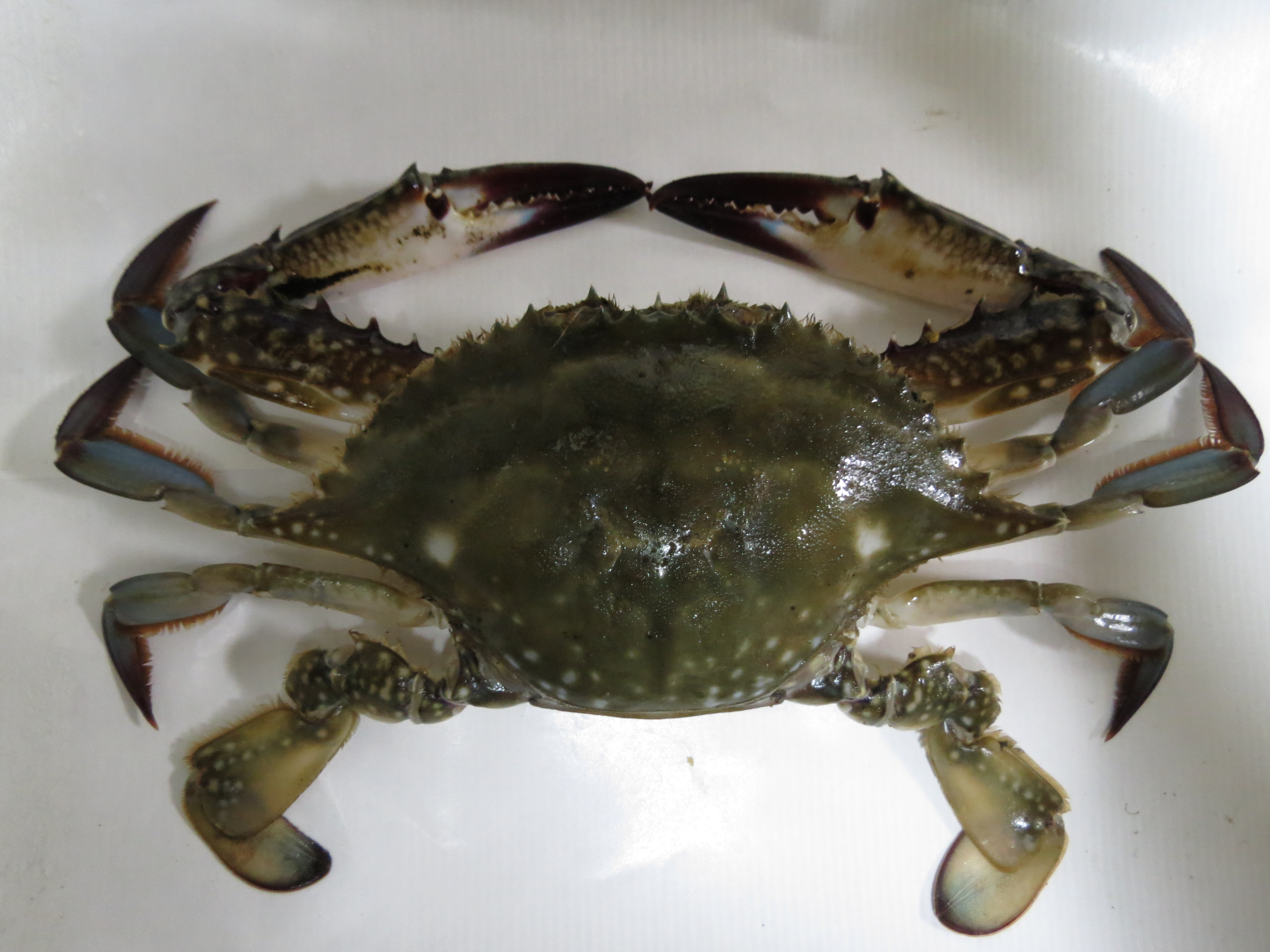 ガザミ(雌個体・背面；Portunus trituberculatus)